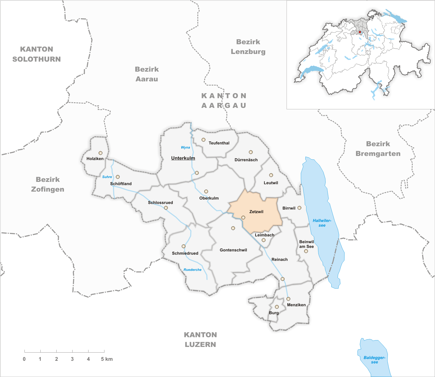 Municipality Zetzwil